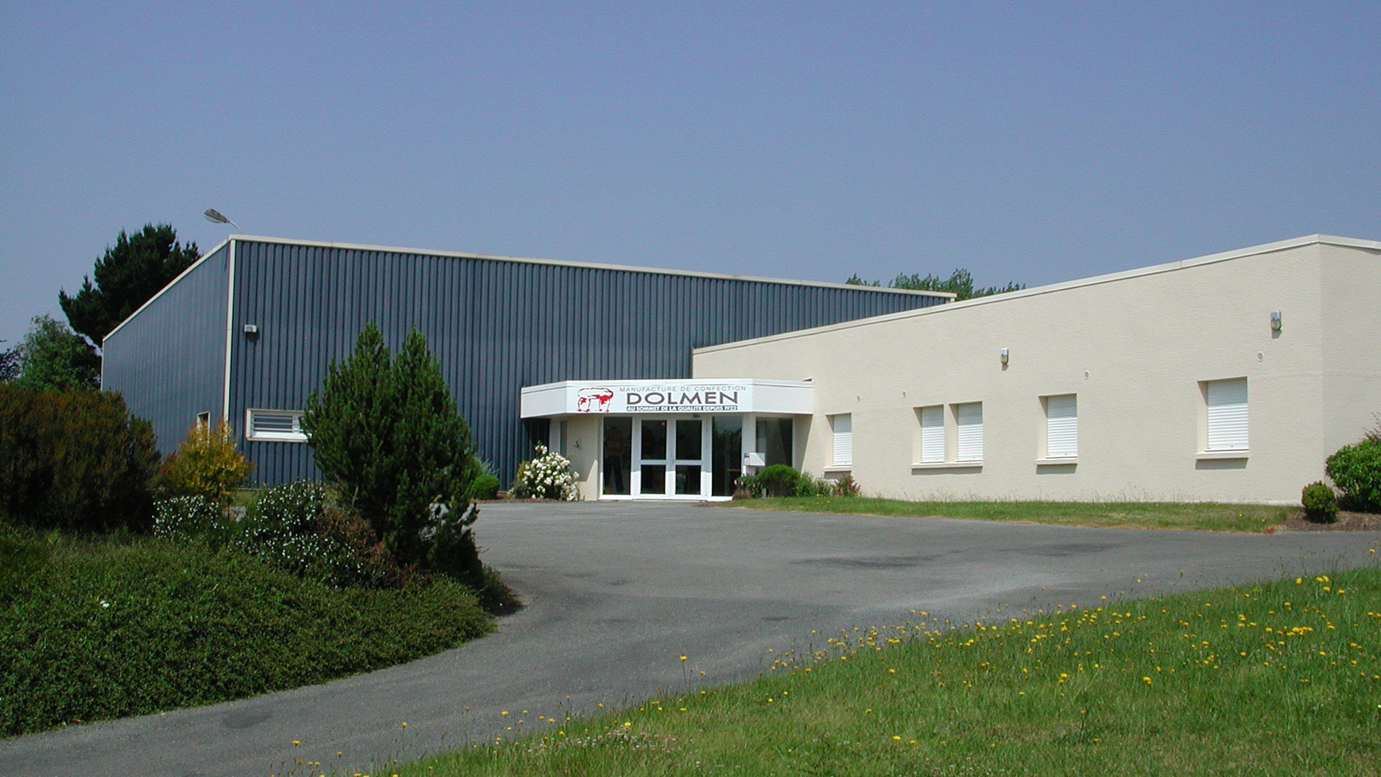 Manufacture de confection "Dolmen"